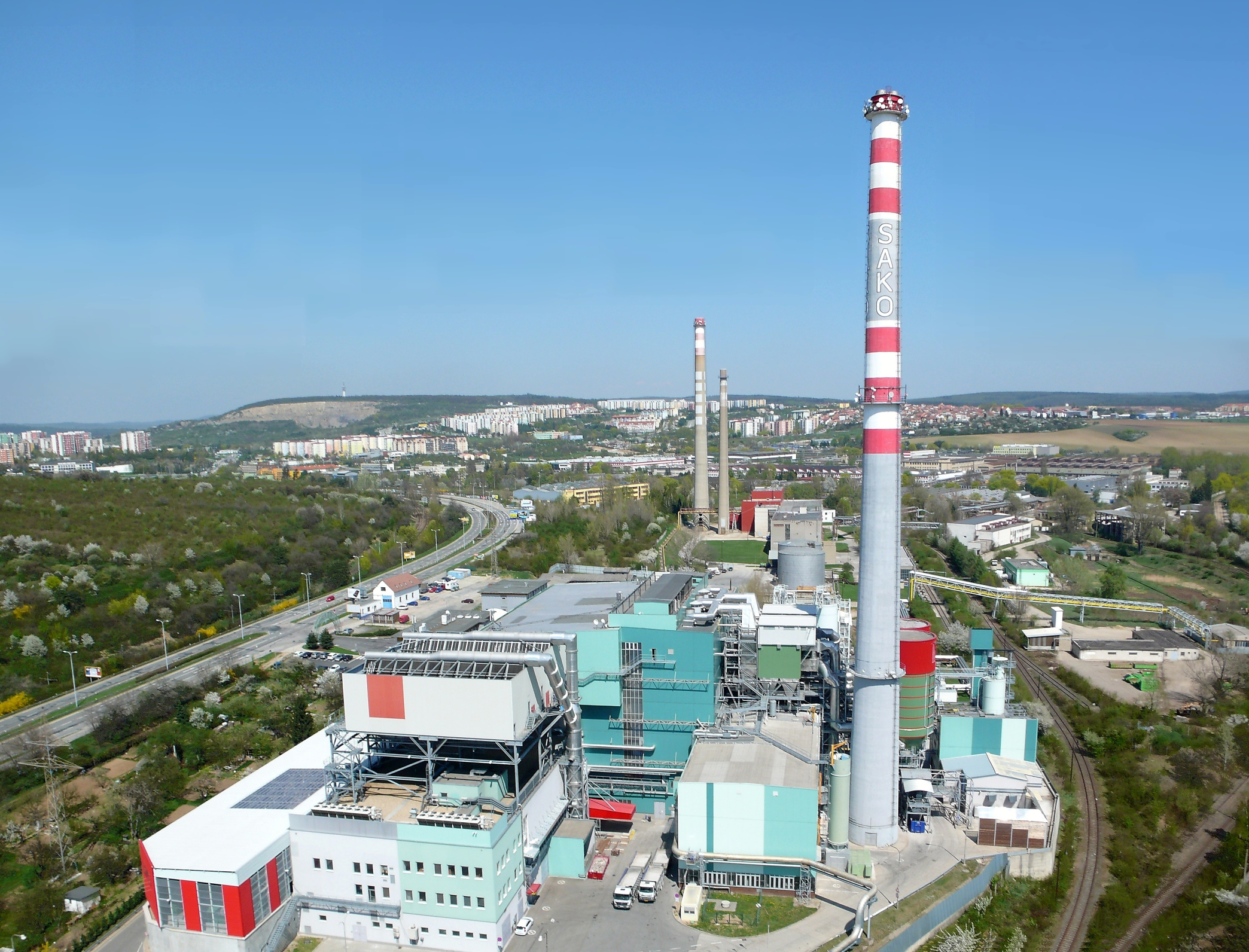 Spalovna Brno